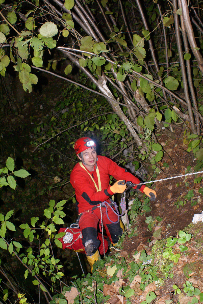 Na sliki se jamar vzpenja iz jame. Prikazana je uporaba ročne prižeme (jamar jo drži z desno roko) in prsne prižeme (na sliki je videti pod desno roko). Jamar uporablja še ostalo opremo kot so čelada, obleka, škornji in vrv.